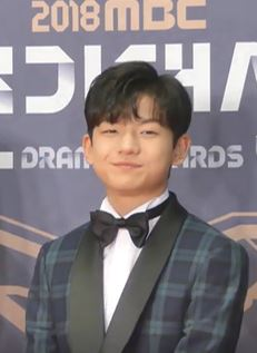 30일 오후 서울시 마포구 상암동 MBC 미디어센터 공개홀에서 '2018 MBC 연기대상' 식전 행사인 레드카펫이 열려 드라마 '신과의 약속'팀 이천희X왕석현X배수빈 배우가 포토월에서 포즈를 취하고 있다.